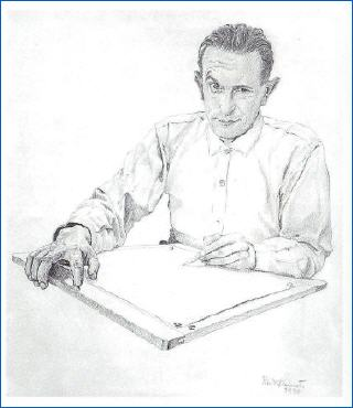 Selbstbildnis